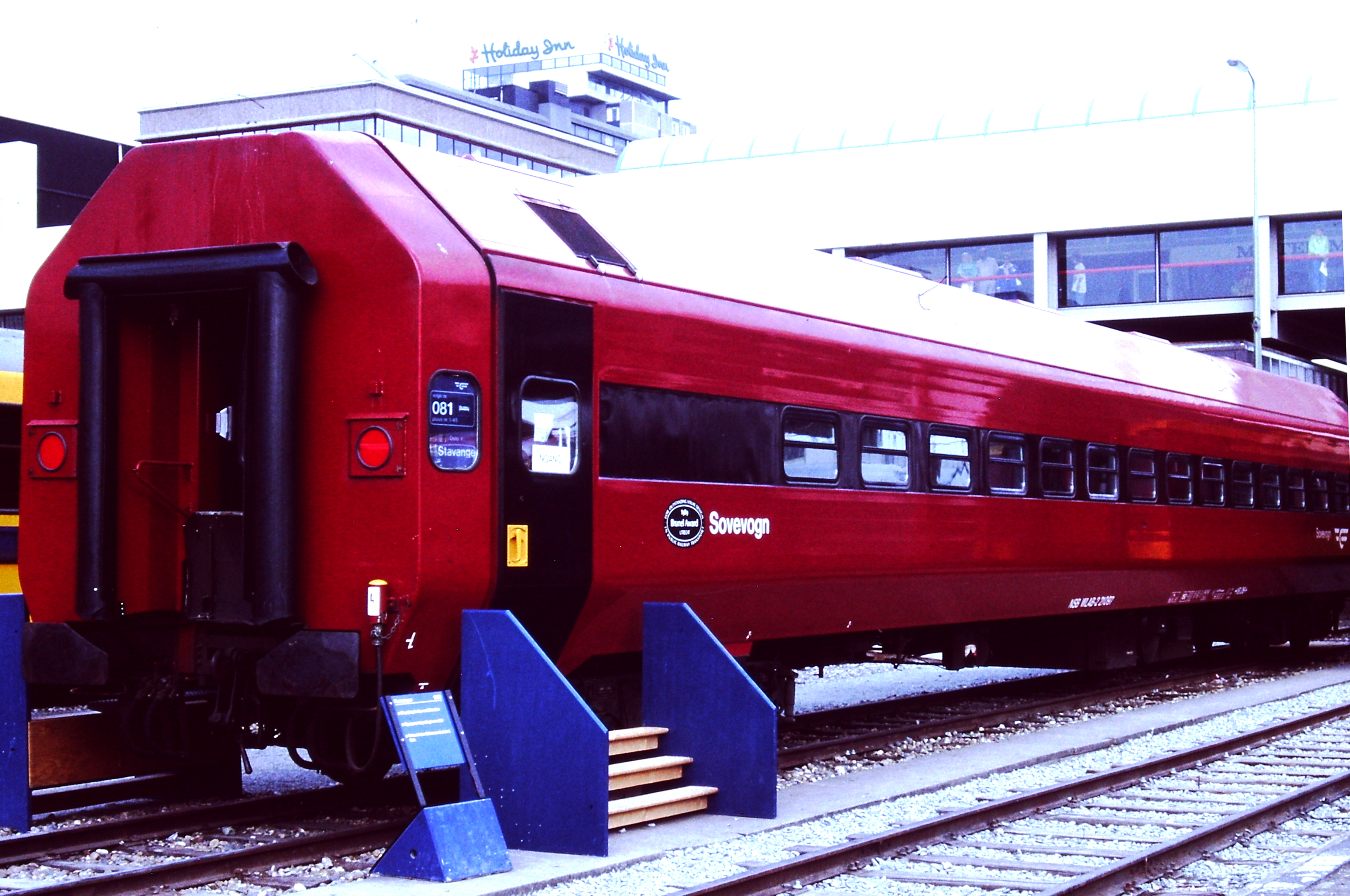 Norges Statsbaner (NSB) slaaprijtuig van het type WLAB-2 nr: 21097 tijdens de manefestatie "150 jaar spoorwegen" tussen 22 juni 1989 en 6 augustus 1989 in Nederland te Utrecht.